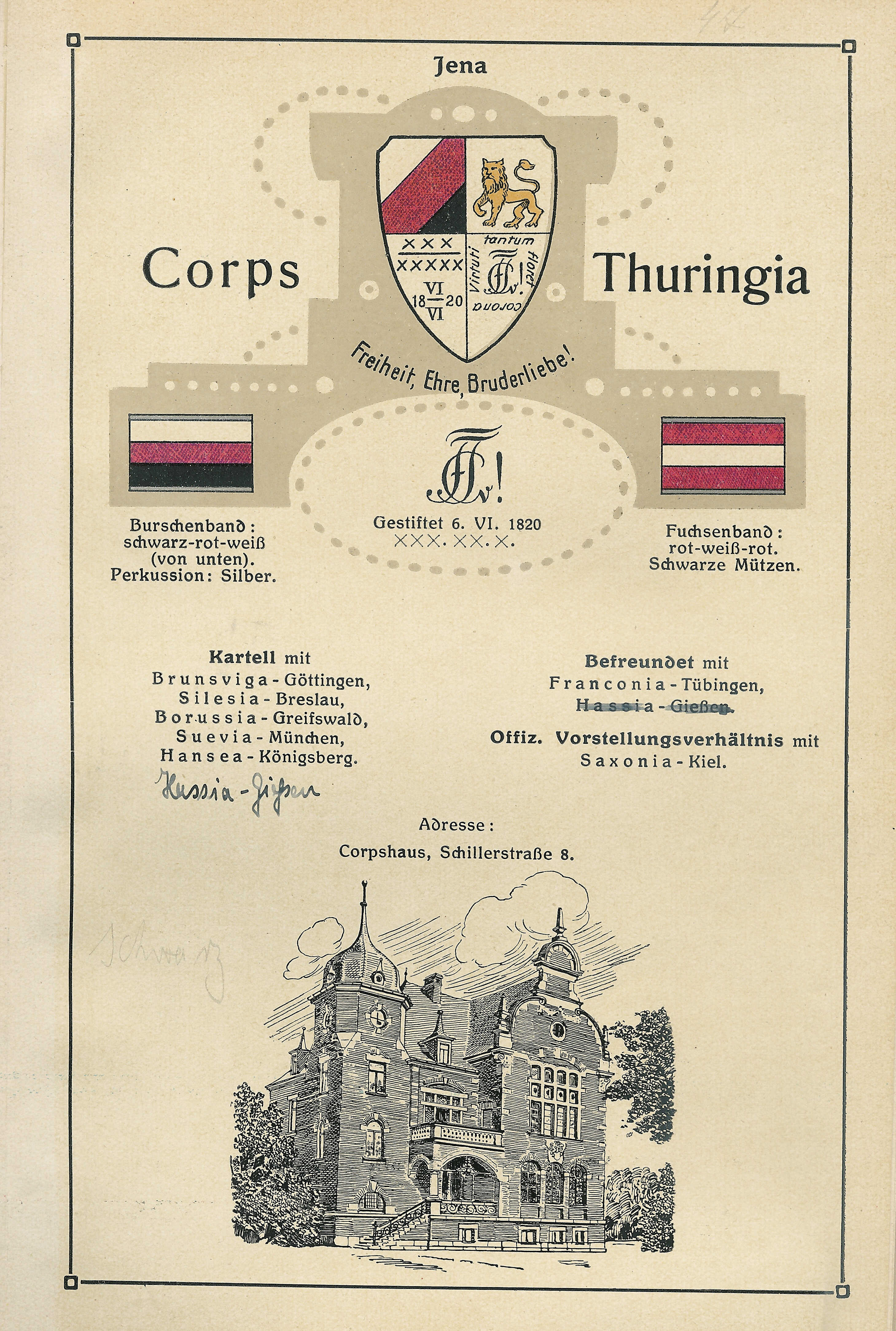 Wappen, Couleur, Zirkel und Corpshaus der Thuringia Jena